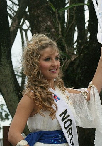 Reina de la Colectividad Nórdica durante el Desfile del Inmigrante, en el marco de la Fiesta Nacional del Inmigrante en 2010 en Oberá, Misiones, Argentina.